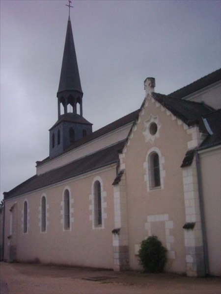 Eglise paroissiale de Monteaux (Loir-et-Cher) dédiée à Saint-Pierre et saint Paul clocher et côté est